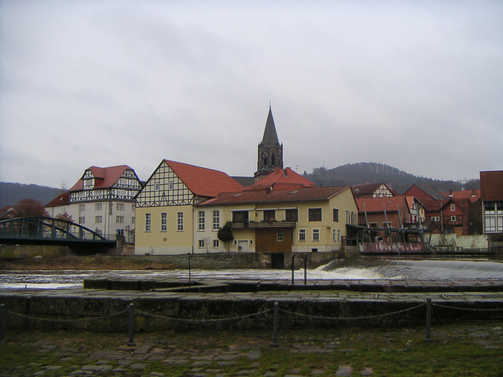 Rotenburg an der Fulda, Blick zur Neustadt vom Fuldaufer. Im Vordergrund Wehr mit Hochwasser